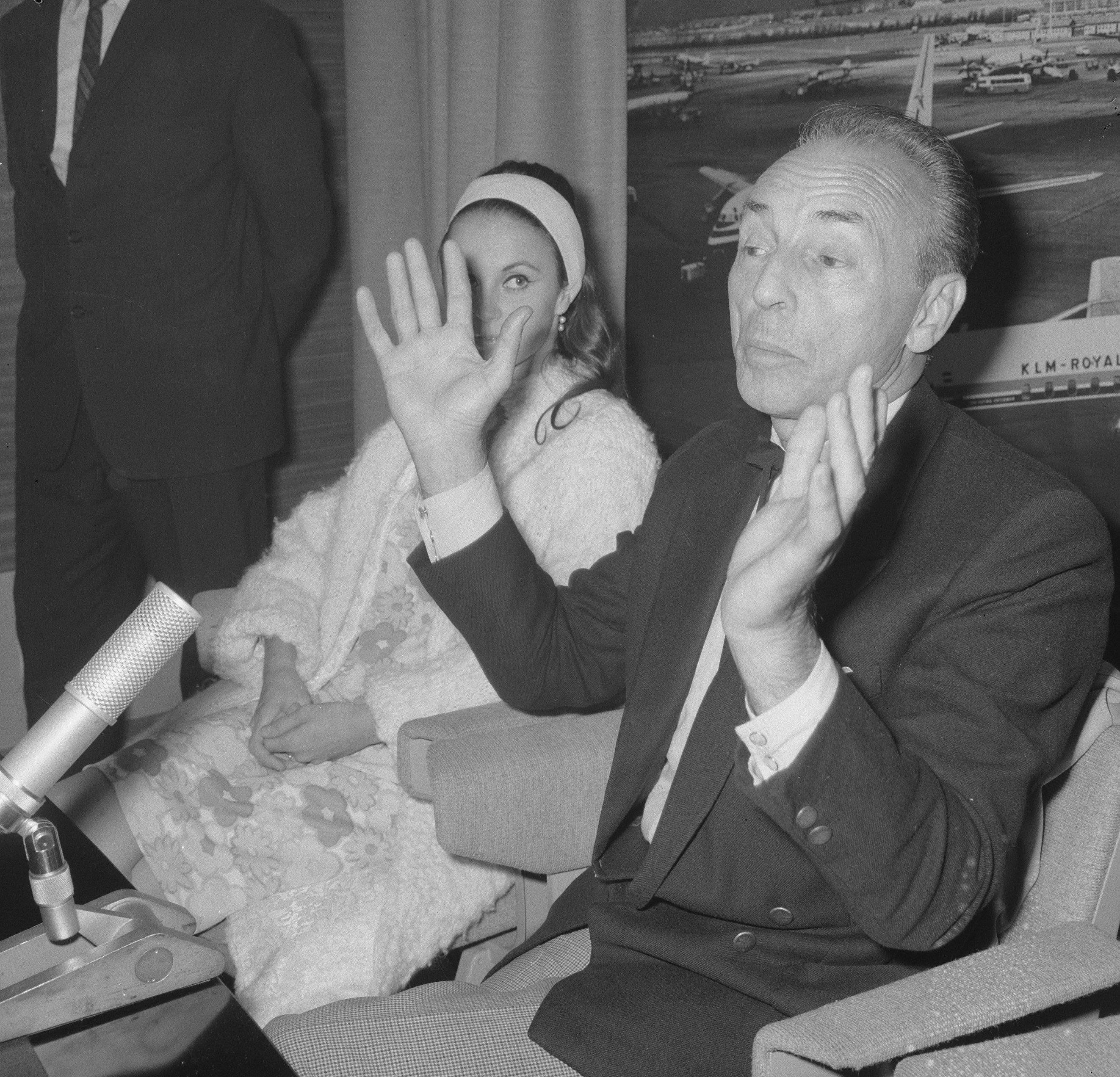 Collectie / Archief : Fotocollectie Anefo Reportage / Serie : [ onbekend ] Beschrijving : George Balanchine op Schiphol Datum : 24 augustus 1965 Locatie : Noord-Holland, Schiphol Trefwoorden : aankomsten Persoonsnaam : George Balanchine Fotograaf : Nijs, Jac. de / Anefo Auteursrechthebbende : Nationaal Archief Materiaalsoort : Negatief (zwart/wit) Nummer archiefinventaris : bekijk toegang 2.24.01.03 Bestanddeelnummer : 918-1048